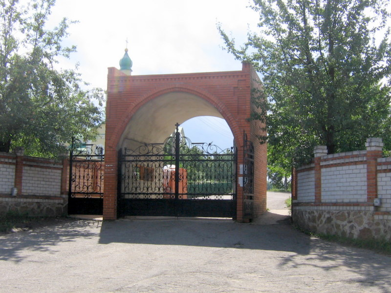 Gates